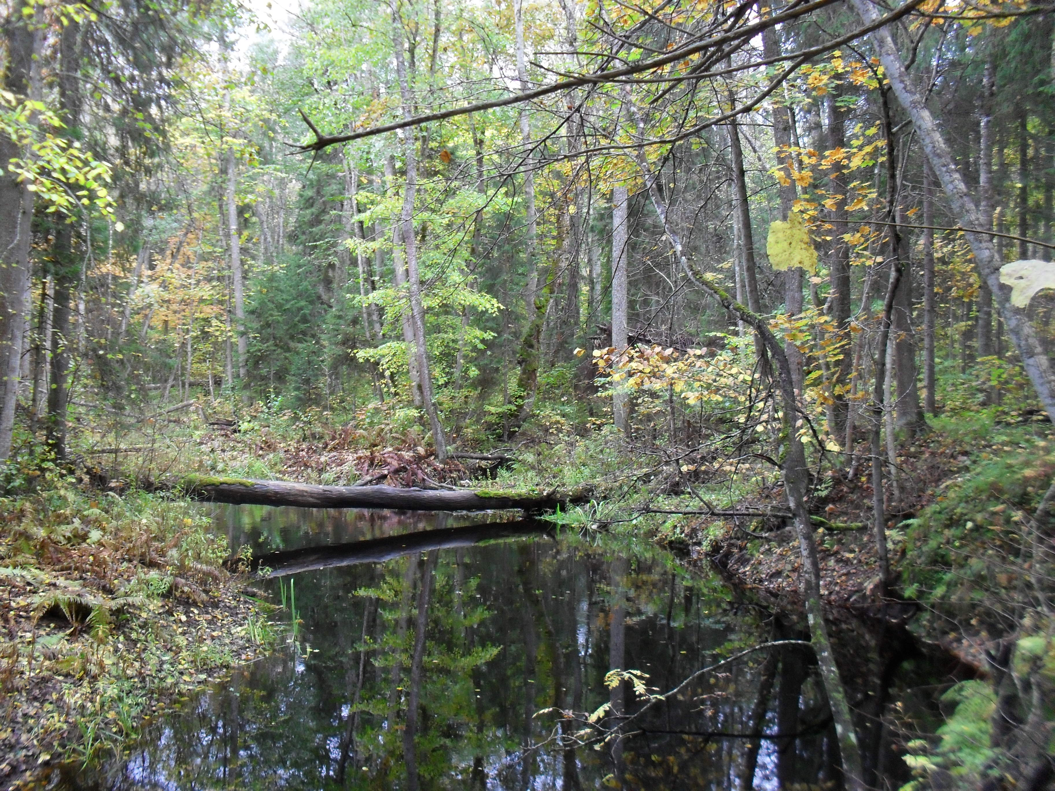 Puhatu looduskaitseala Liguski sihtkaitsevöönd Ida-Virumaal Illuka vallas Puhatu külas.